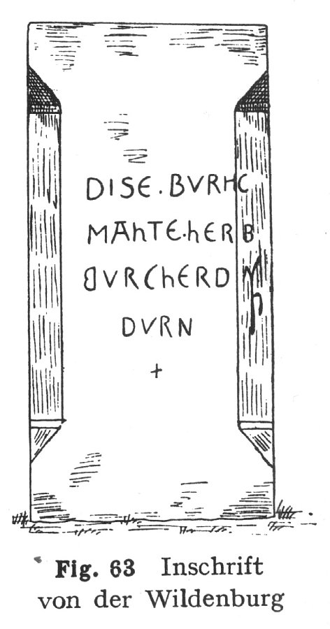 Burg Wildenberg, Bauinschrift: DISE BURHC MAHTE HER BURCHERD DURN - DIESE BURG ERBAUTE (MACHTE) HERR BURKHARD VON DÜRN